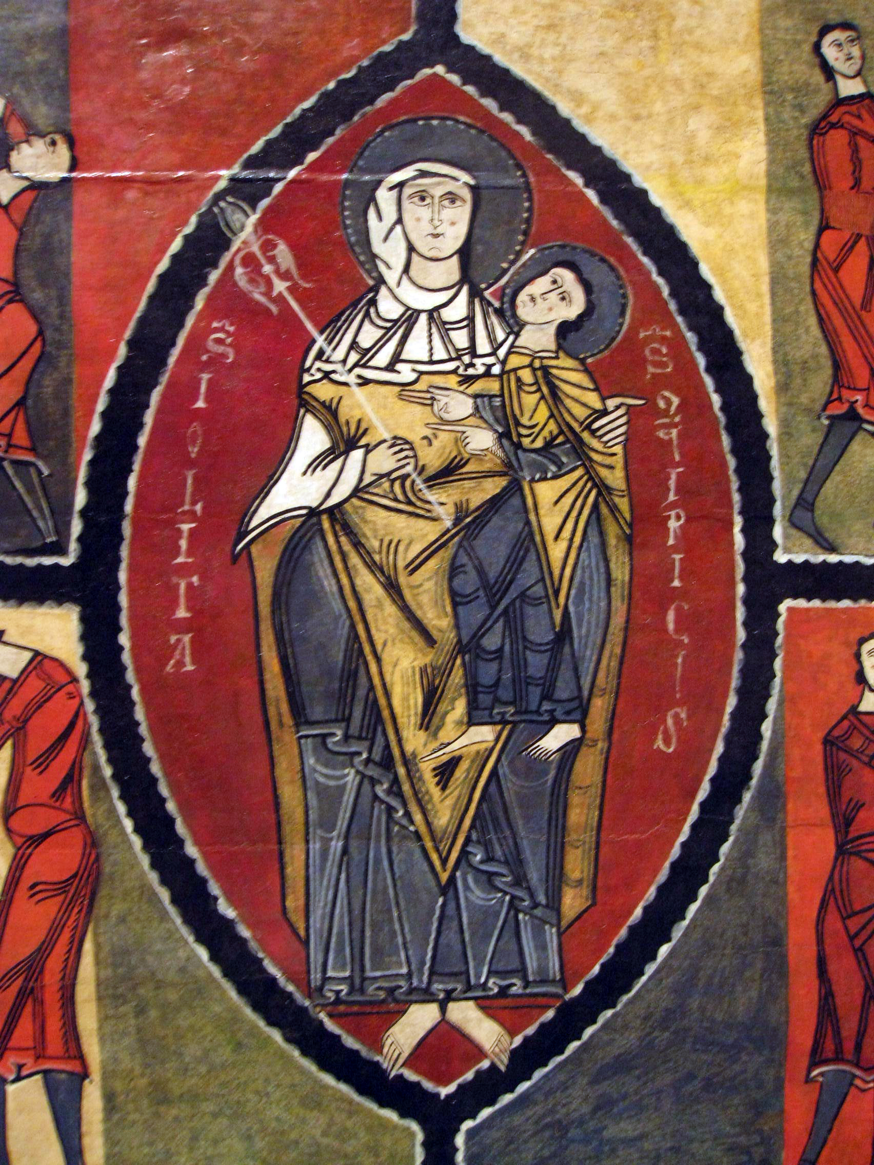 Palau Nacional (Barcelona)